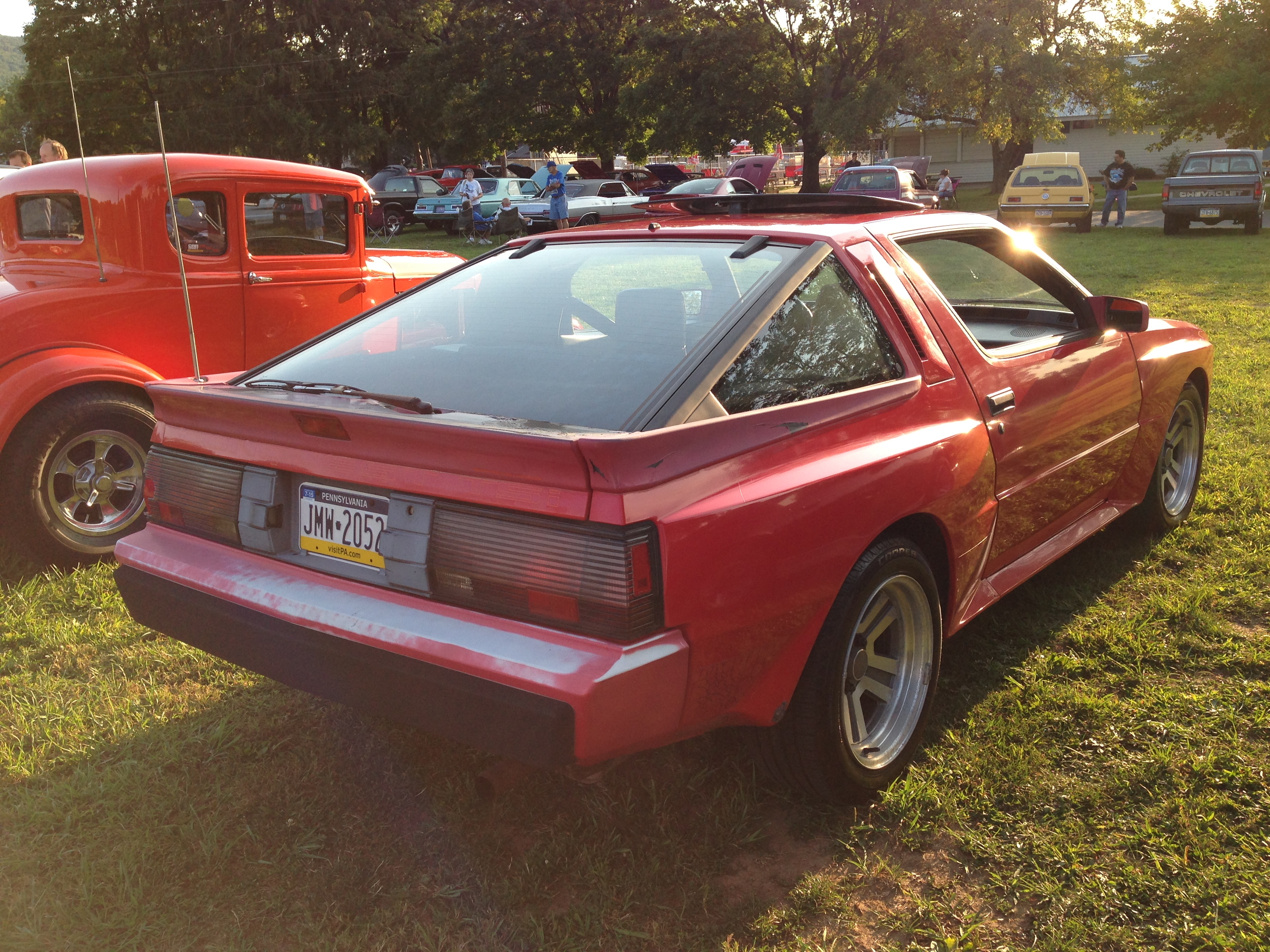 Chrysler Conquest